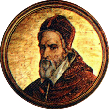 Pope Gregory XIV